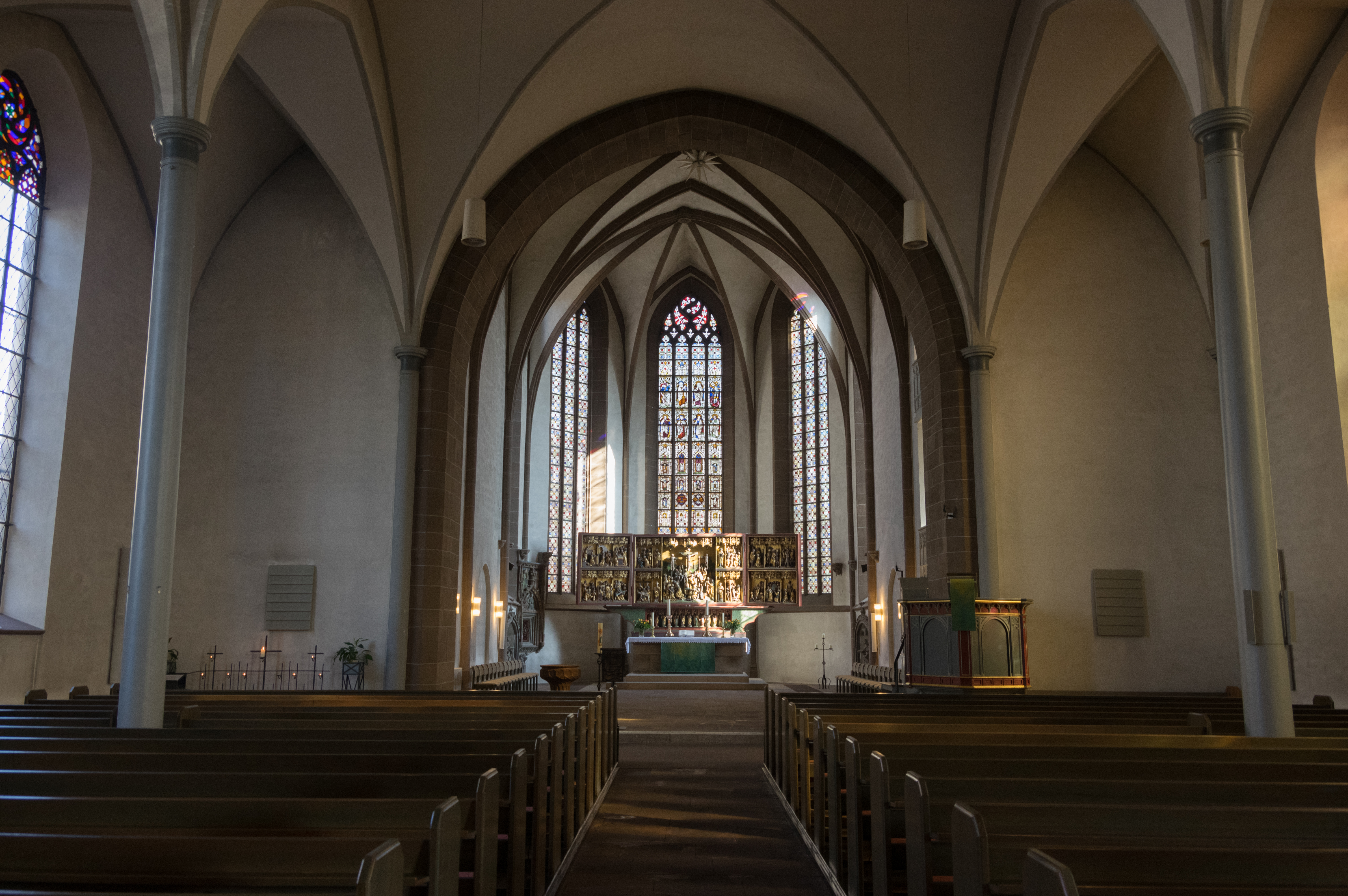 Uslar in Niedersachsen. Die Kirche steht unter Denkmalschutz.